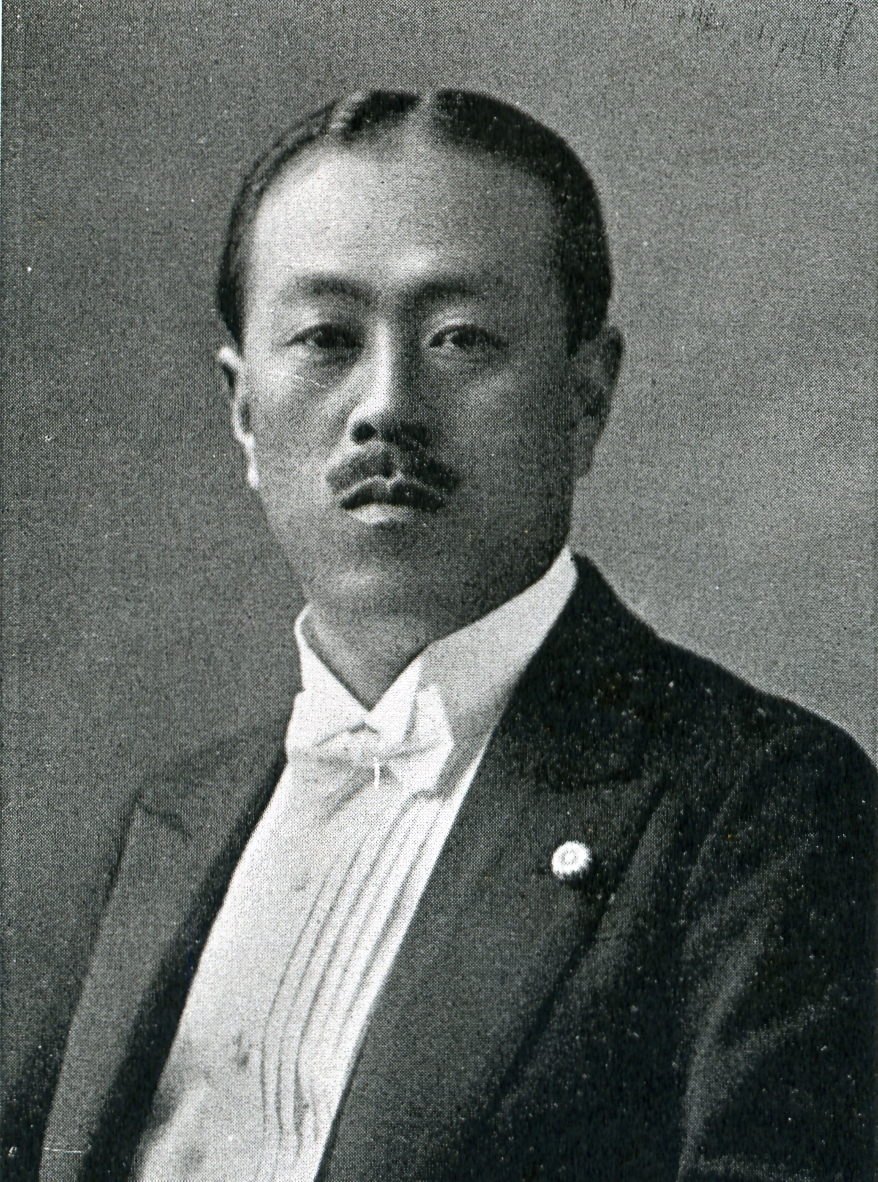 この写真は、崎山武夫（1890-1934）の写真です。